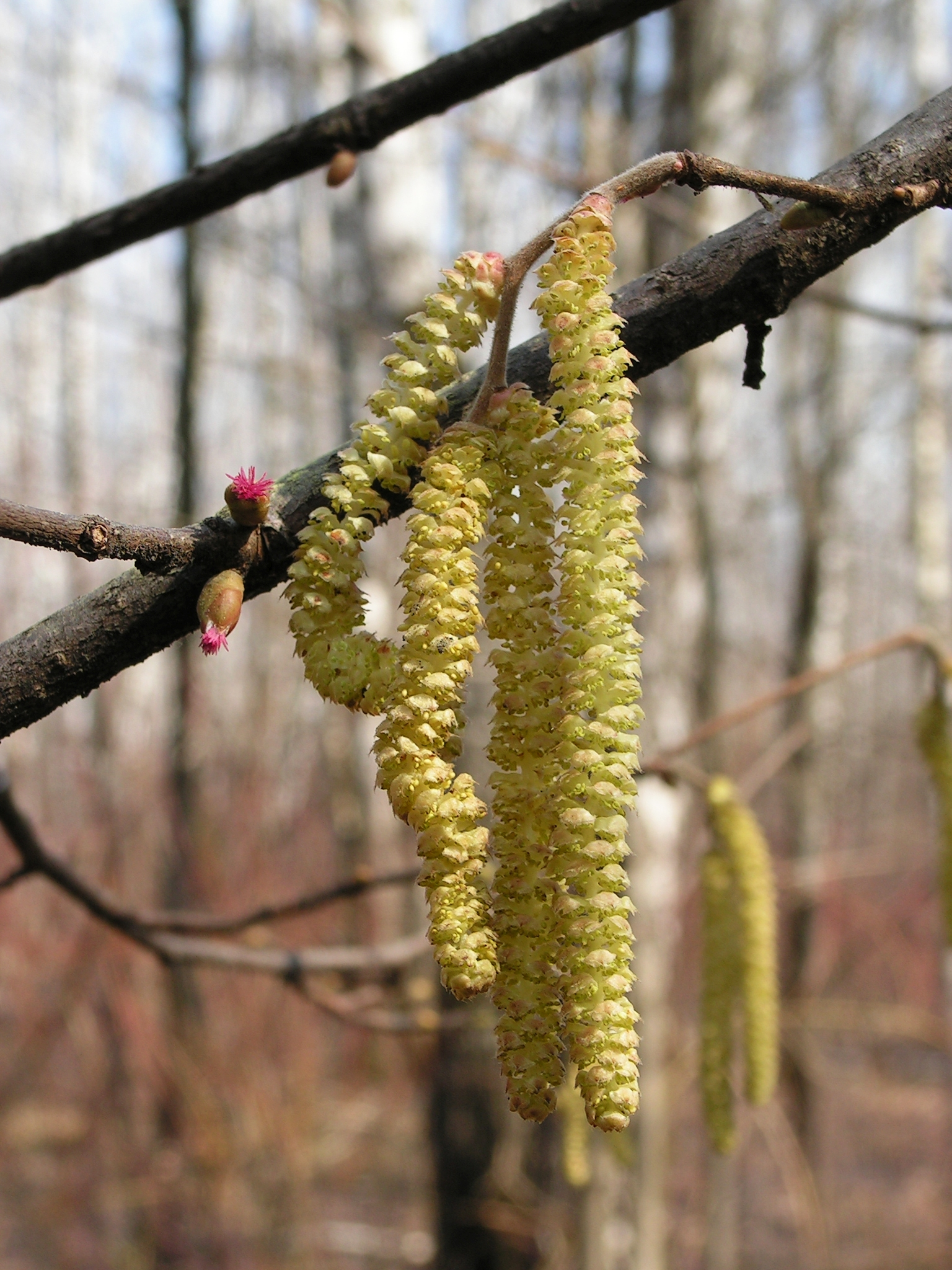 Corylus avellana L. Moscow region, Russia.